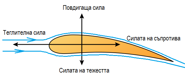 Илюстрация към статия аеромеханика